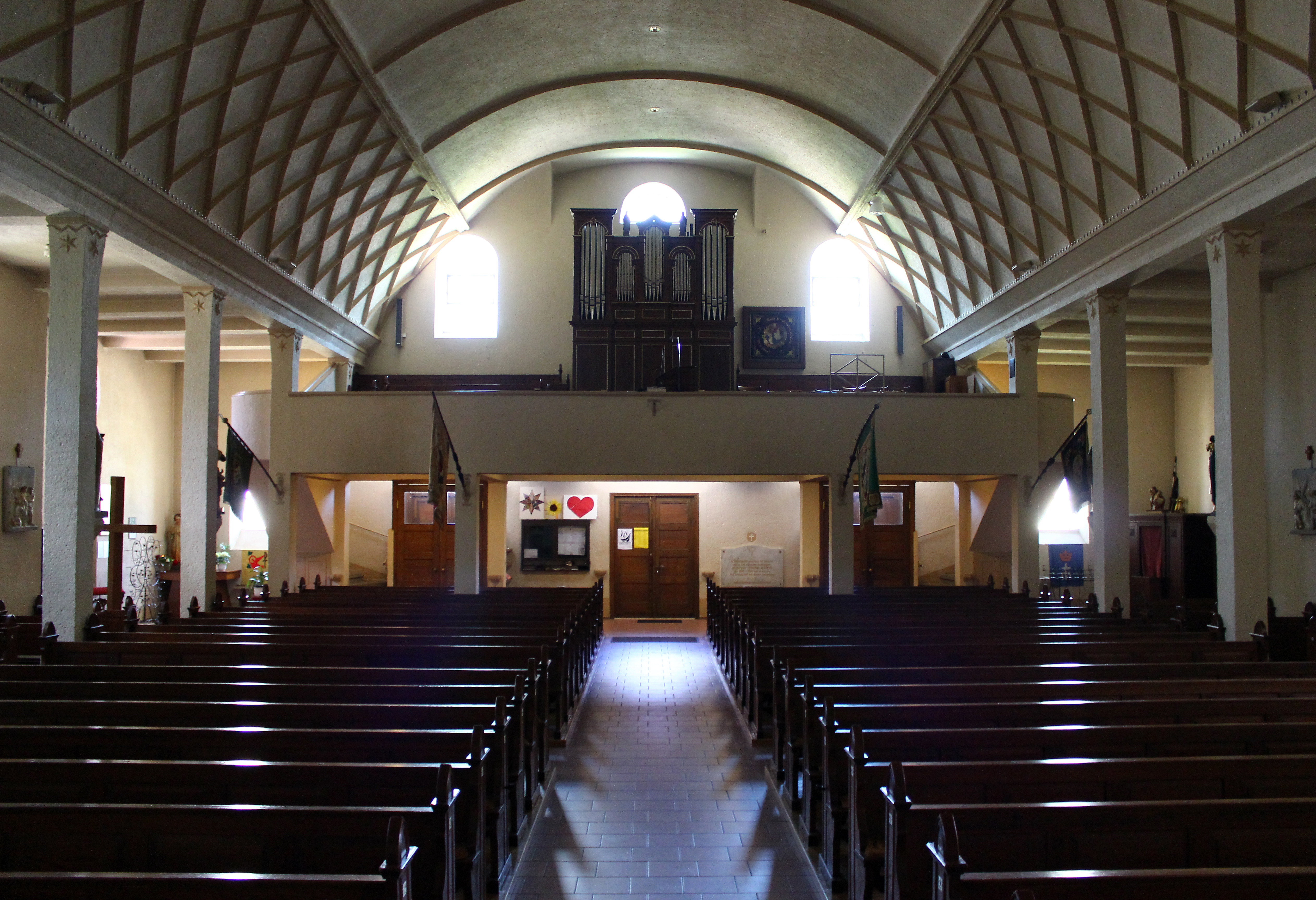 Blick ins Innere der katholischen Pfarrkirche St. Martin in Ittersdorf, einem Ortsteil der Gemeinde Wallerfangen, Landkreis Saarlouis, Saarland